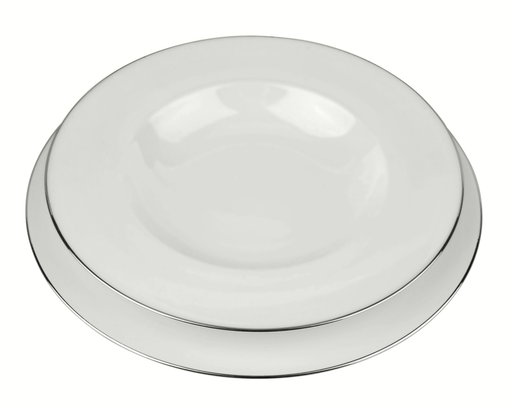 Tellerset (Suppenteller, Essteller) aus der Service-Serie Anmut Platinum des Herstellers Villeroy & Boch (V&B) Material: weißes Premium Bone Porcelain. Dekor: silbernes Platinband.